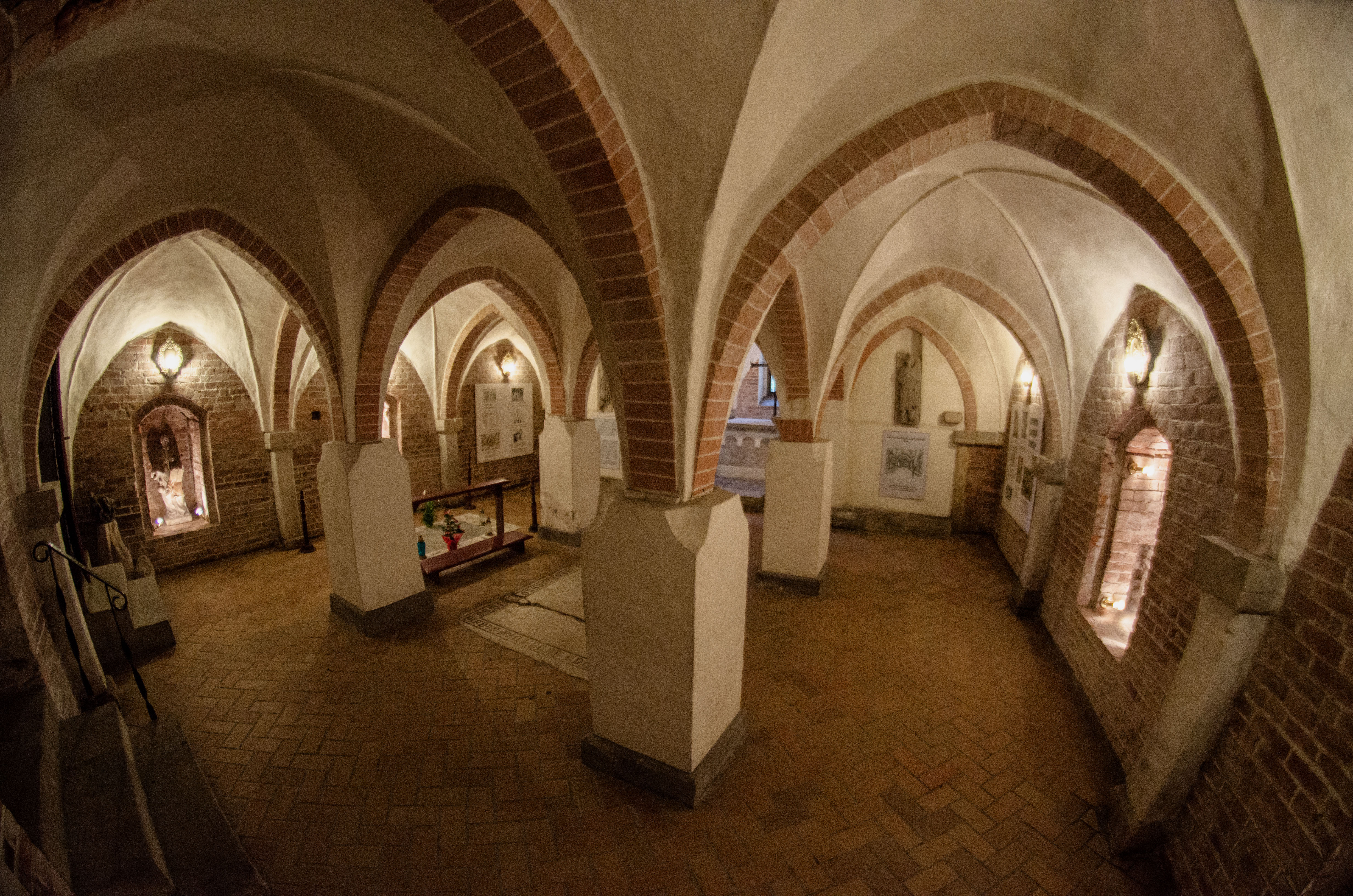 Trzebnica, kościół, ob. par. p.w. śś. Bartłomieja i Jadwigi, 2 poł. XIII